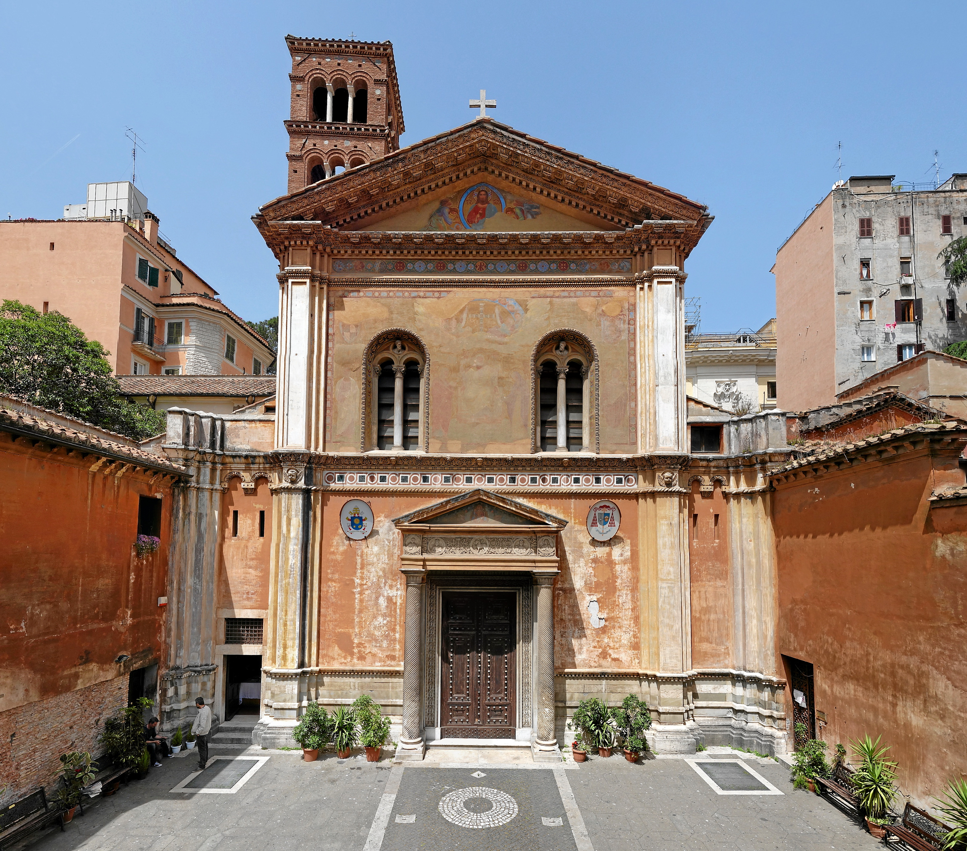 Базилика Санта-Пуденциана